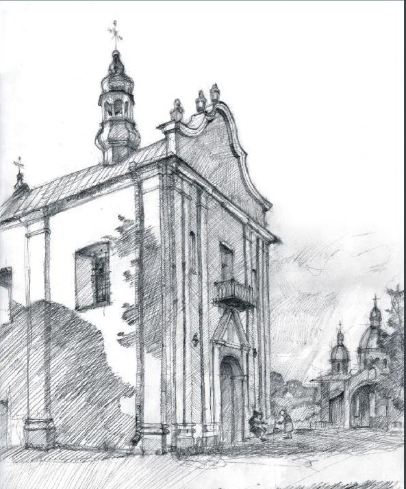 Церква Пресвятої Трійці (Зарваниця) рисунок виконав художник А. Боярин